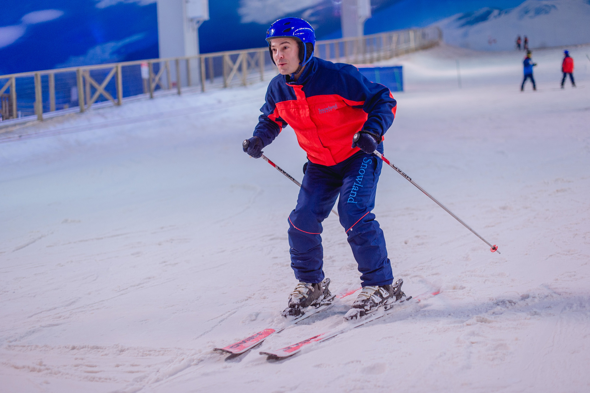 Viva a Neve!